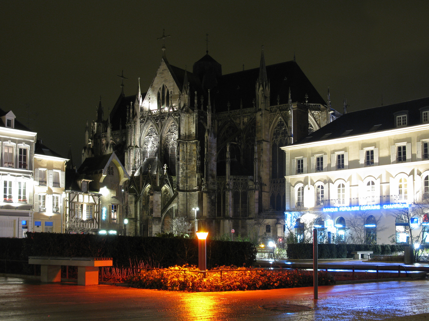 Basilique Saint-Urbain (Classé) .